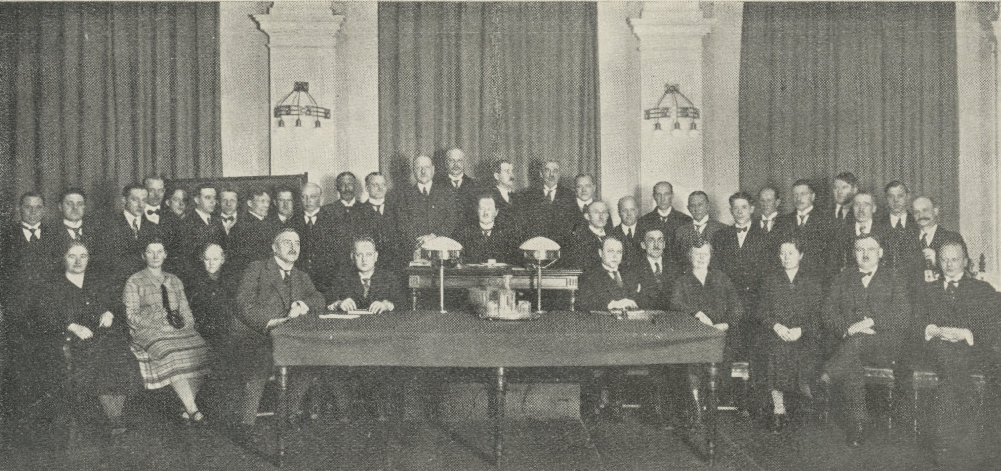 Halmstads år 1927 nyvalda stadsfullmäktige. Sittande från vänster: fruarna Hofstedt och Abrahamsson, fröken Lindström, t. f. borgmästare Fogelklou, stadsf:s v. ordf. O Brodin. Sittande vid bordet Stadsfullm, ordf; rektor E. Hernqvist; Sittande till höger: stadsombudsman Rydell, K. A. Johansson, fröknarna Lundberg och Allinger, Wahlbeck och Holmqvist; Stående från vänster: O. F. Jansson, Olof Persson, Herman Bengtsson, Engström, Ivan Bengtsson, Edv. Pettersson, Artur Karlsson, Grahn, Edv. Jansson, Hammarskjöld, Wallberg, Lindström, Wendt, Grönqvist, Georg Swensson, Thimoteusson, Oscar Jönsson, Gottfrid Svensson, Ernst R. Andersson, Gräslund, Ernst Lindqvist, John Persson, Joh. Carlsson, C. A. Carlsson, Hillgård, Ad. Svensson, Tjellander och Emil Bengtsson, På bilden saknas Linder och Karl Larsson, vilka voro frånvarande vid sammanträdet, då fotot togs.